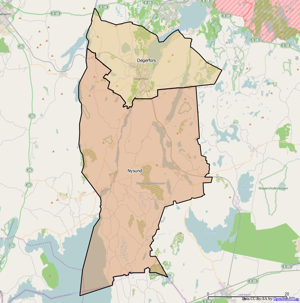 Distriktsindelningen i Degerfors kommun